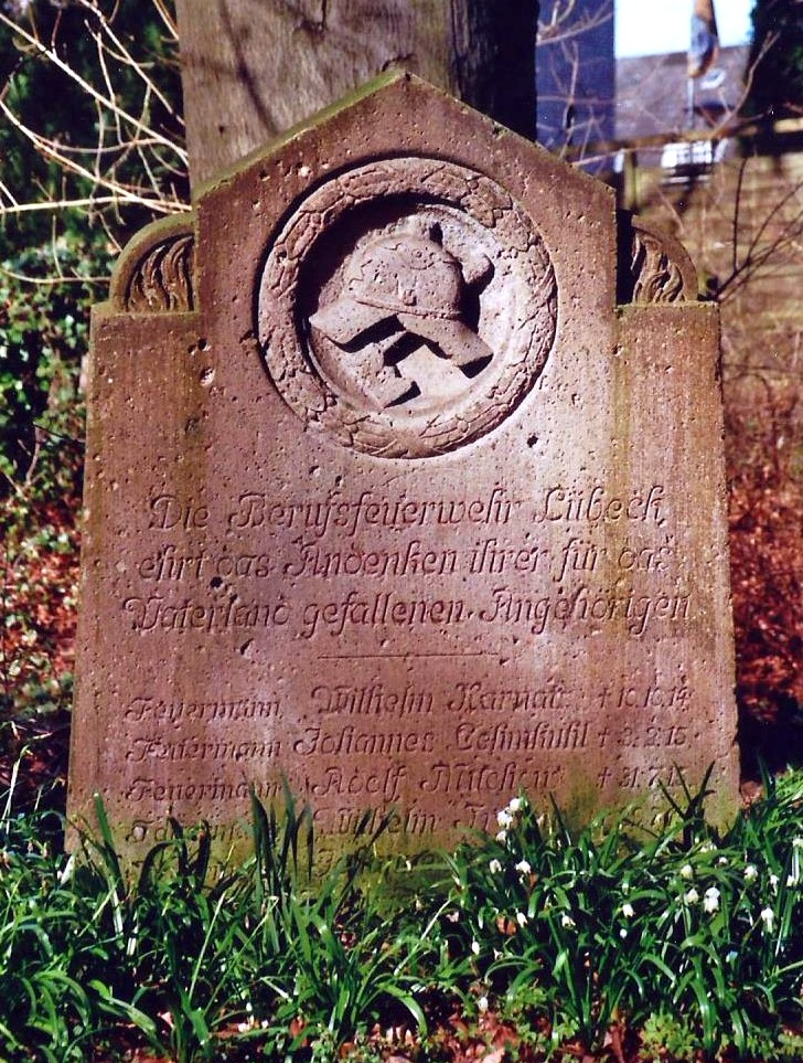 Gedenkstein für die im Ersten Weltkrieg gefallenen der Lübeckischen Feuerwehr.